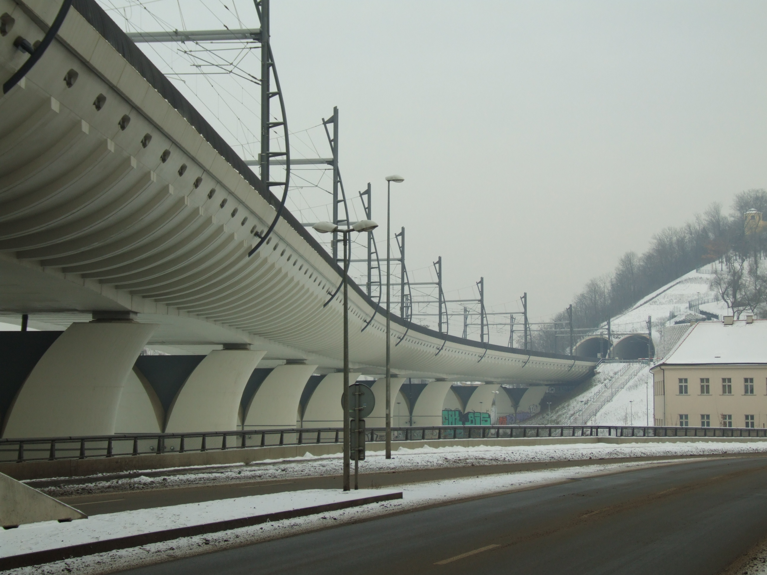 Nové spojení v Praze, Žižkovská část v prosinci 2010